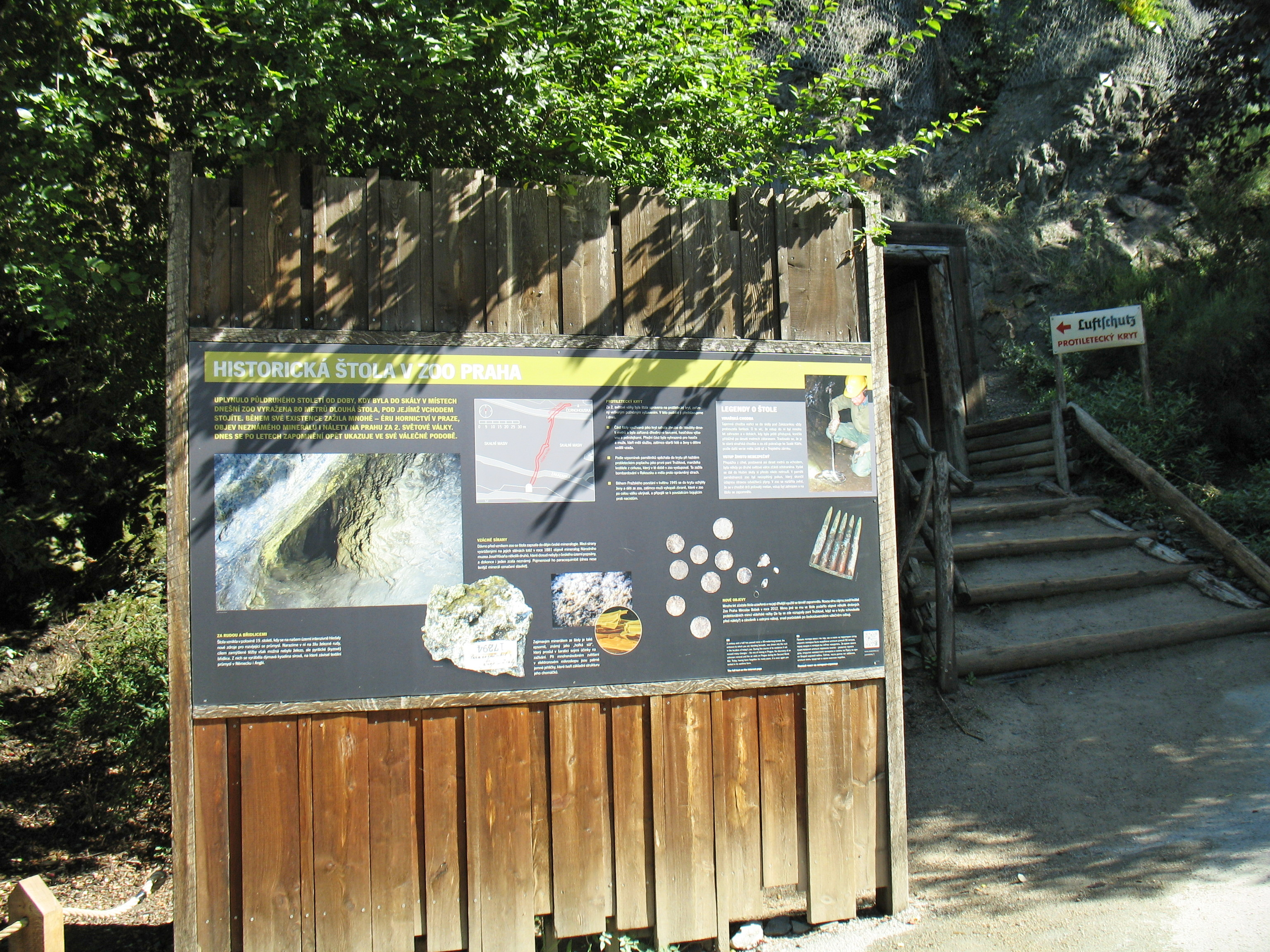 Štola z 19. století na území pražské zoologické zahrady, která sloužila za 2. světové války jako protiletecký kryt